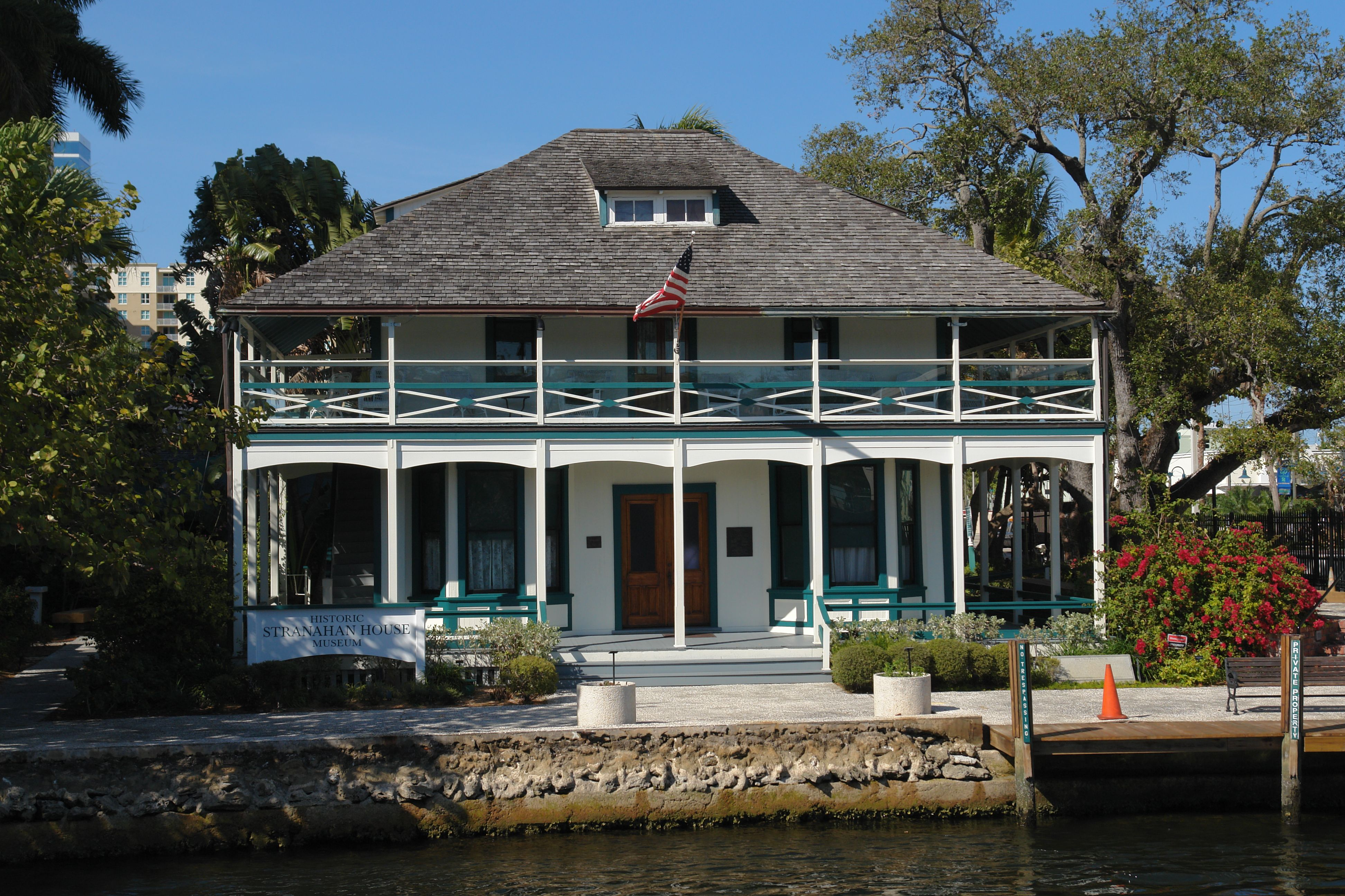 Fort Lauderdale Historic Stranahan museum